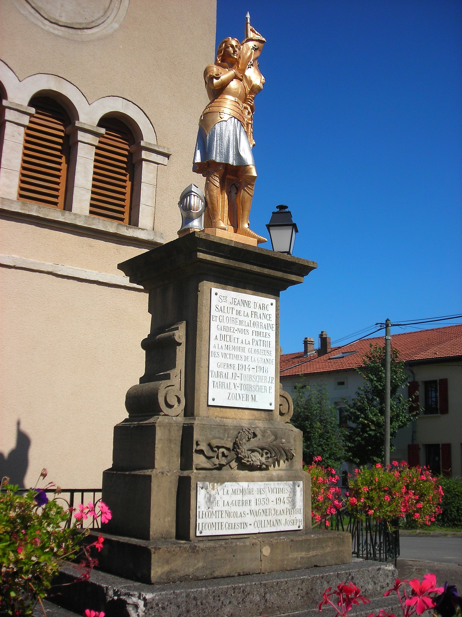 D'après E. Toussaint: Statue de Jeanne d'Arc en pied en armure, portant étendard, le casque posé derrière le pied droit, surmontant le monument aux morts érigé derrière l'église de Niedervisse, Moselle, Lorraine, France.[1])